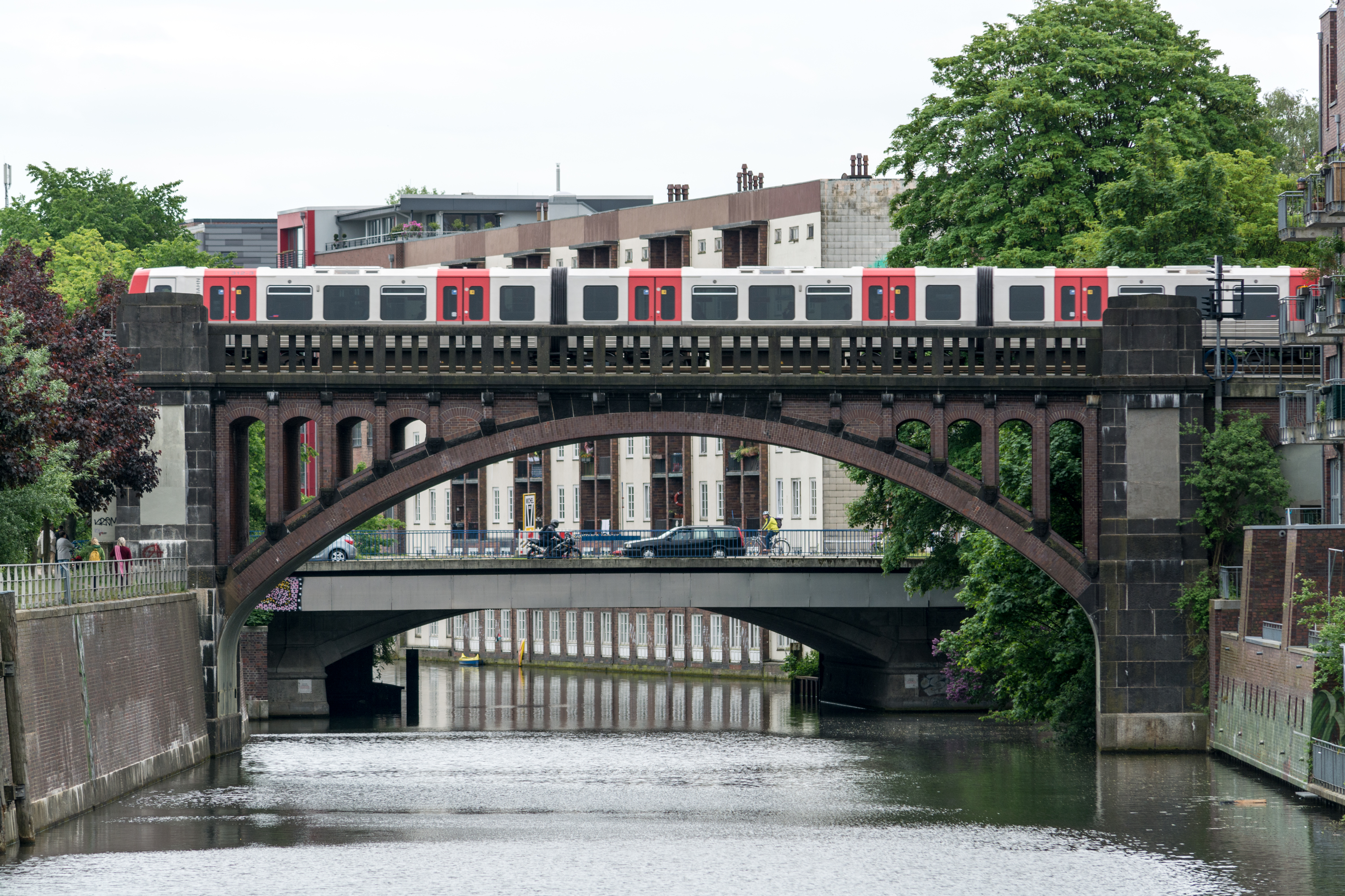 U-Bahnbrücke über den Osterbekkanal in Hamburg, Blick von der Hufnerstraßenbrücke. This is a photograph of an architectural monument.